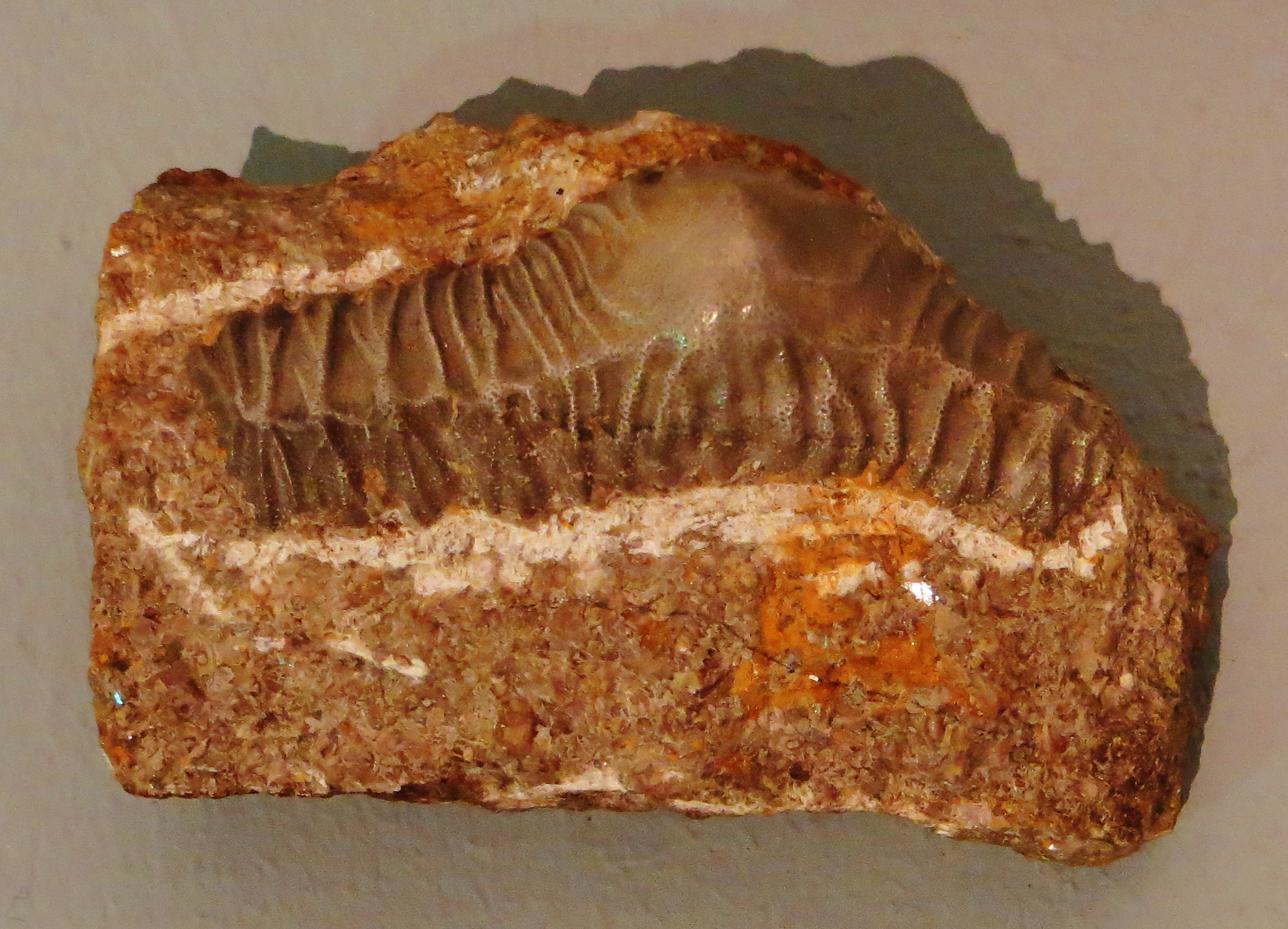 Fossil of Orodus, an extinct fish- Took the picture at Museum of Paleontology, Tubingen